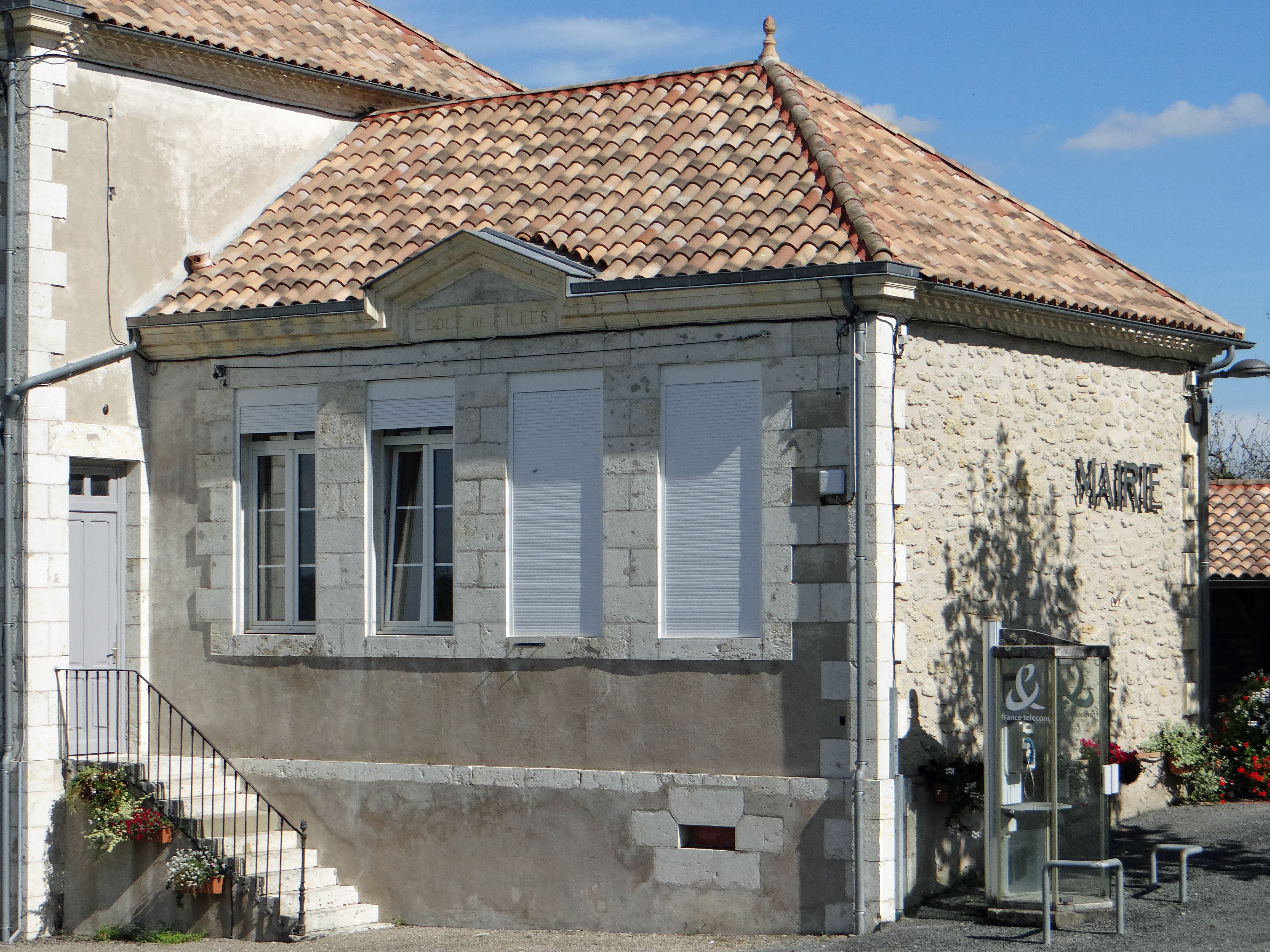 Monteton - Mairie